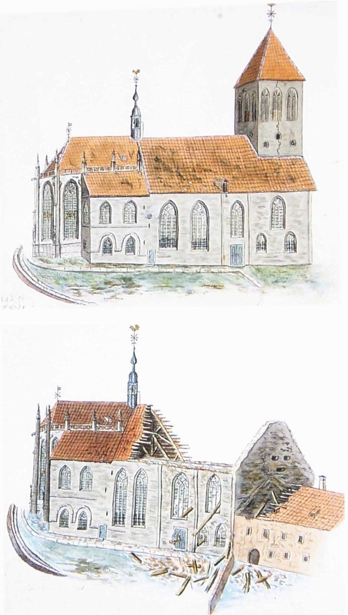 Alte Pfarr- und Klosterkirche St. Aegidii Münster (Westfalen); 1821 abgerissen. Aquarell von 1821.